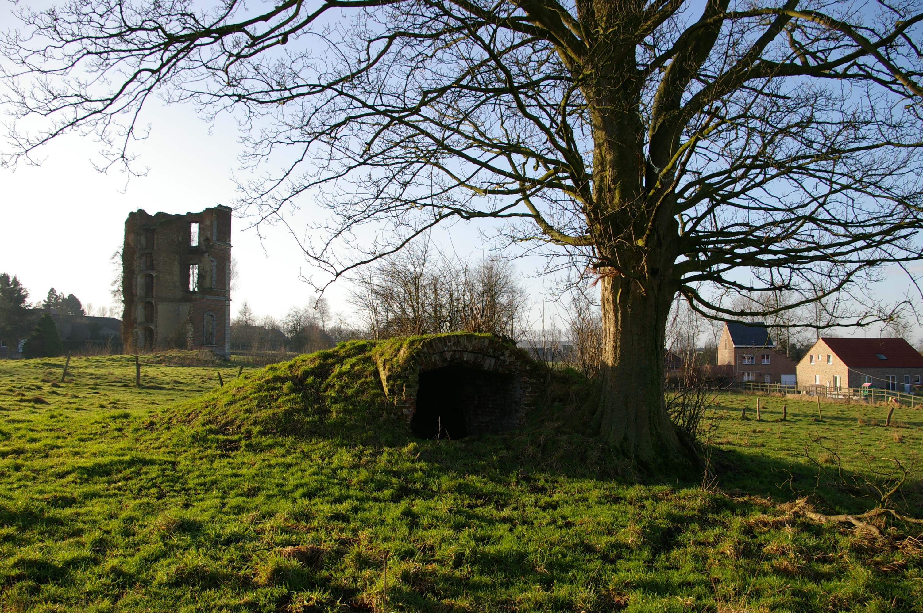 Ruines du château de la glacière - Ormeignies (Ath-Belgique)